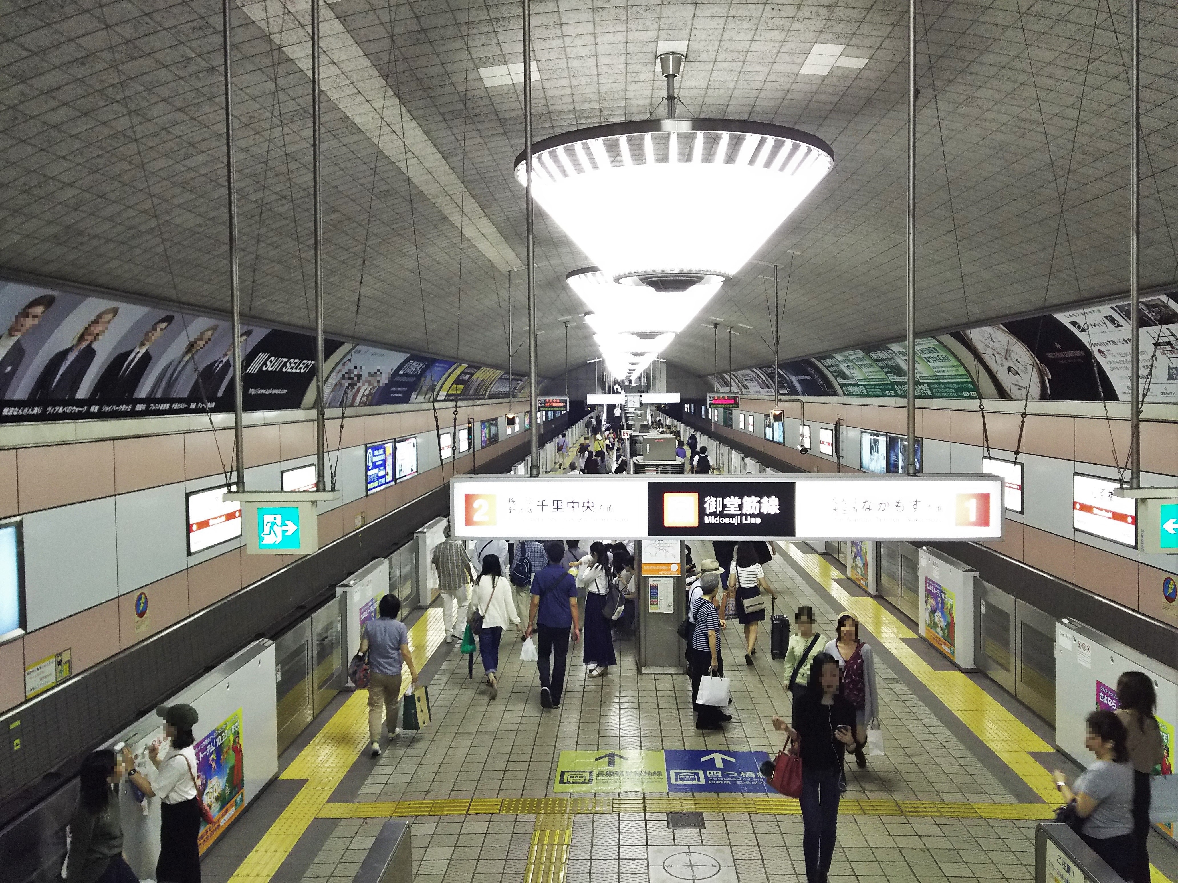 大阪市営地下鉄御堂筋線心斎橋駅プラットホーム（大阪市中央区）